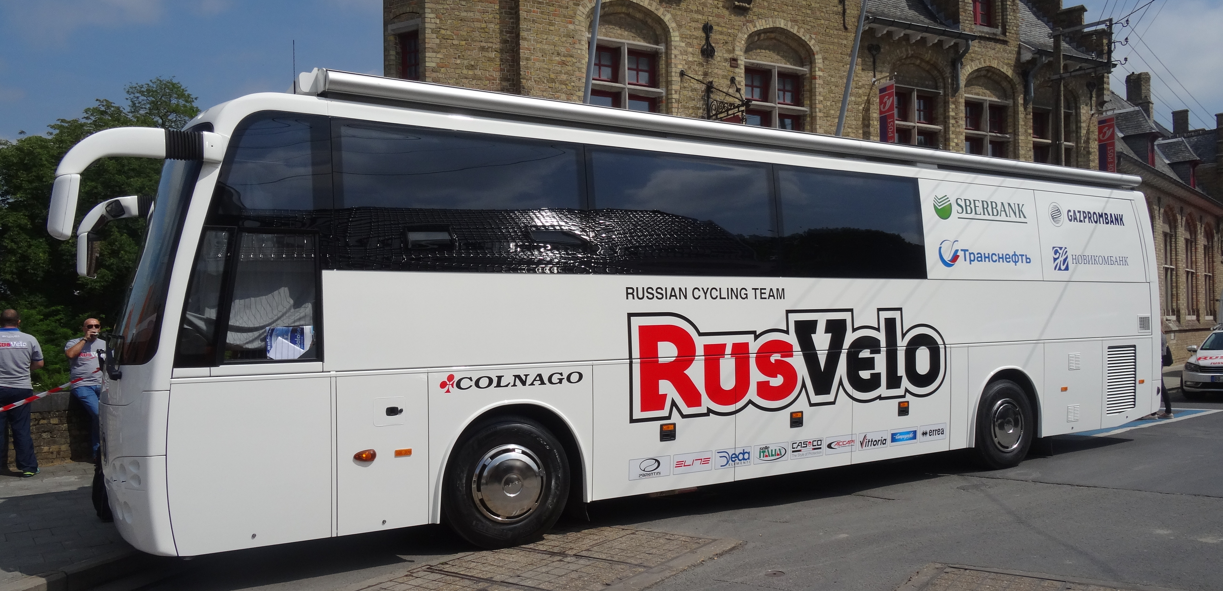 Reportage photographique réalisé le vendredi 30 mai à l'occasion du contre-la-montre individuel de la troisième étape du Tour de Belgique 2014 à Dixmude, Belgique.